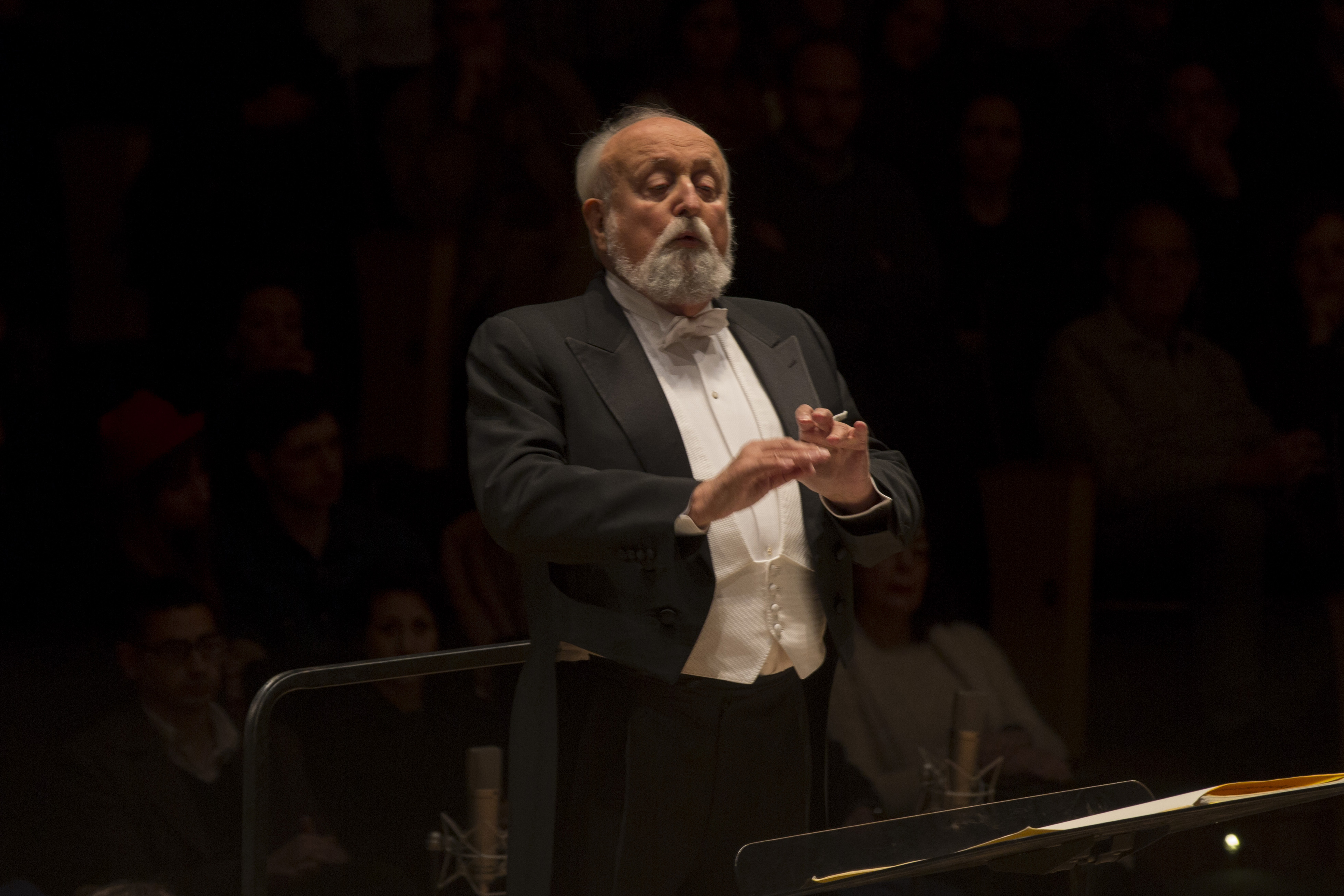 Buenos Aires, 2 de septiembre de 2016 - Krzysztof Penderecki dirigió a la Orquesta Sinfónica Nacional, en la Sala Sinfónica del CCK. Fotos: Romina Santarelli / Ministerio de Cultura de la Nación.